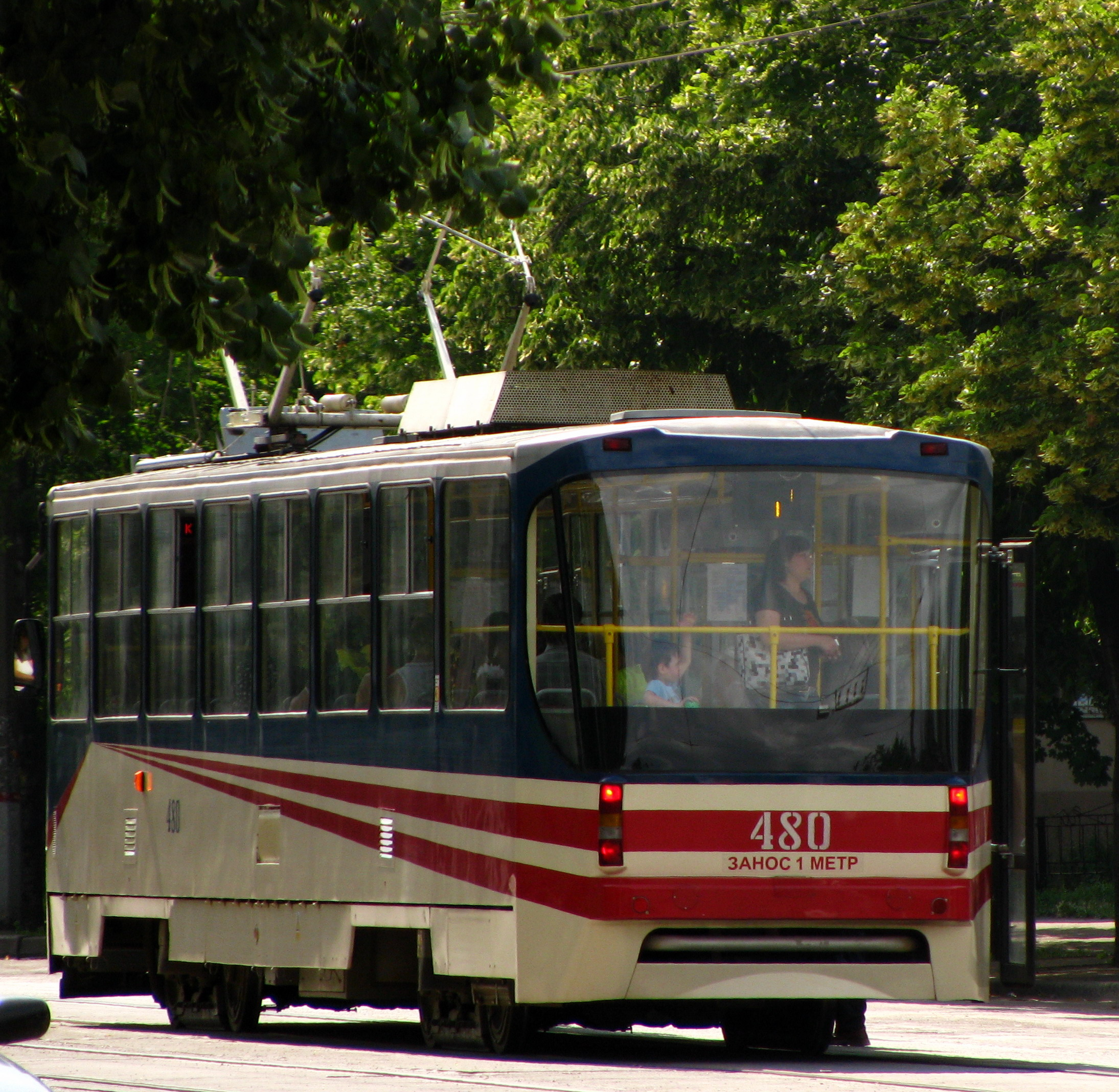 Трамвайний вагон К-1 у Кривому Розі (вид ззаду).